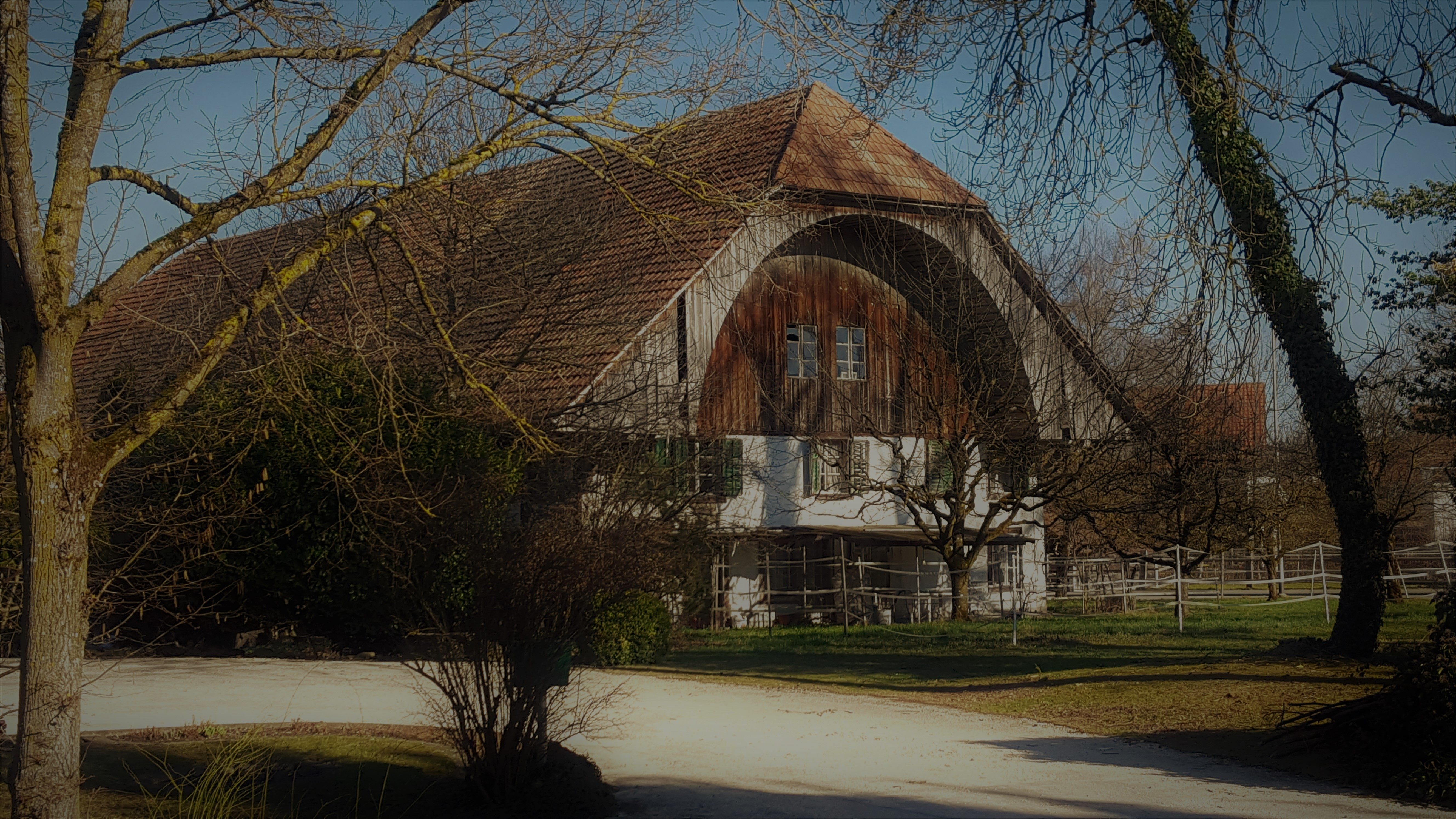 Bauerhaus in Oekingen